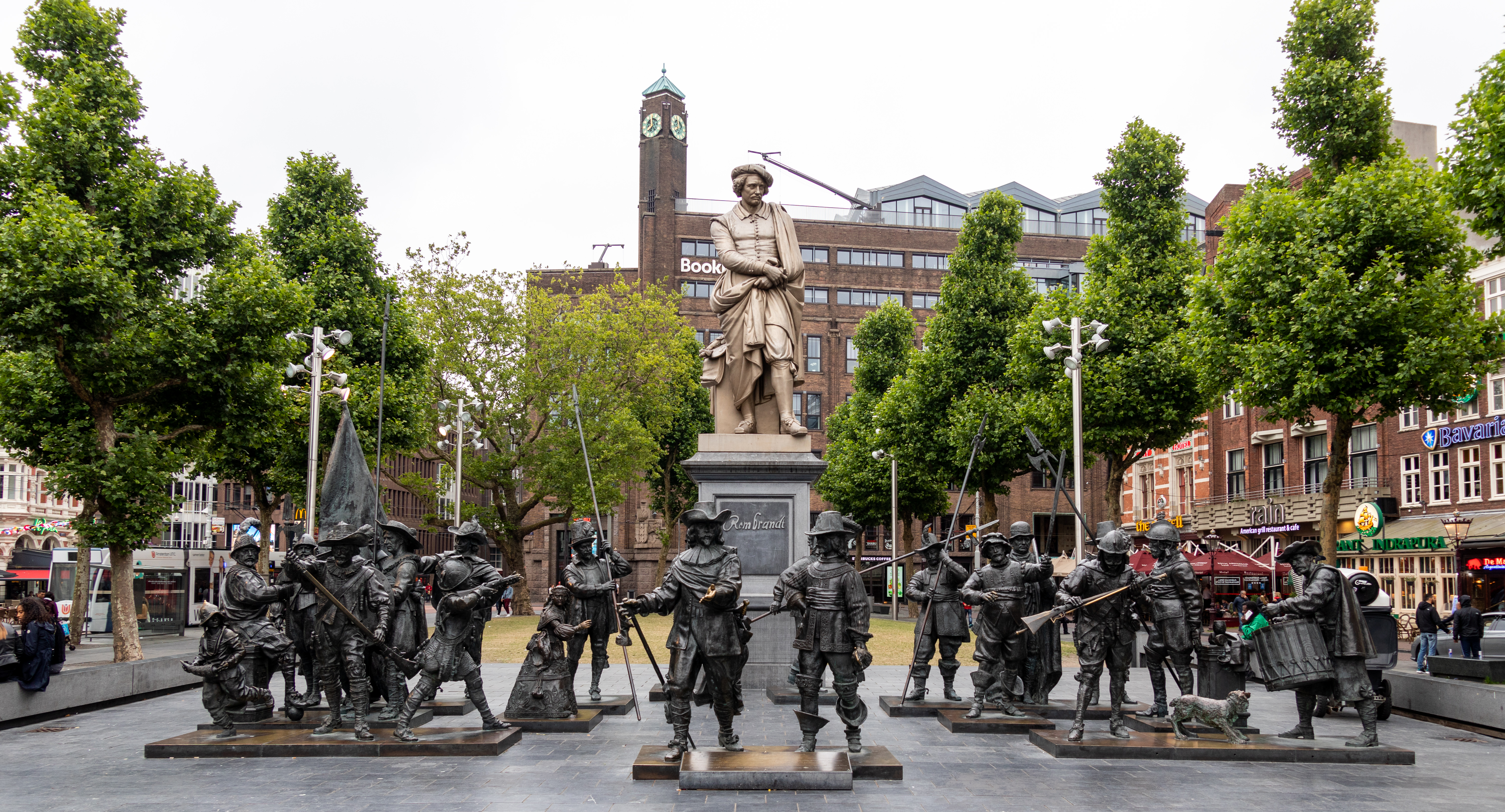 Rembrandtmonument "Amsterdam, June 2018"